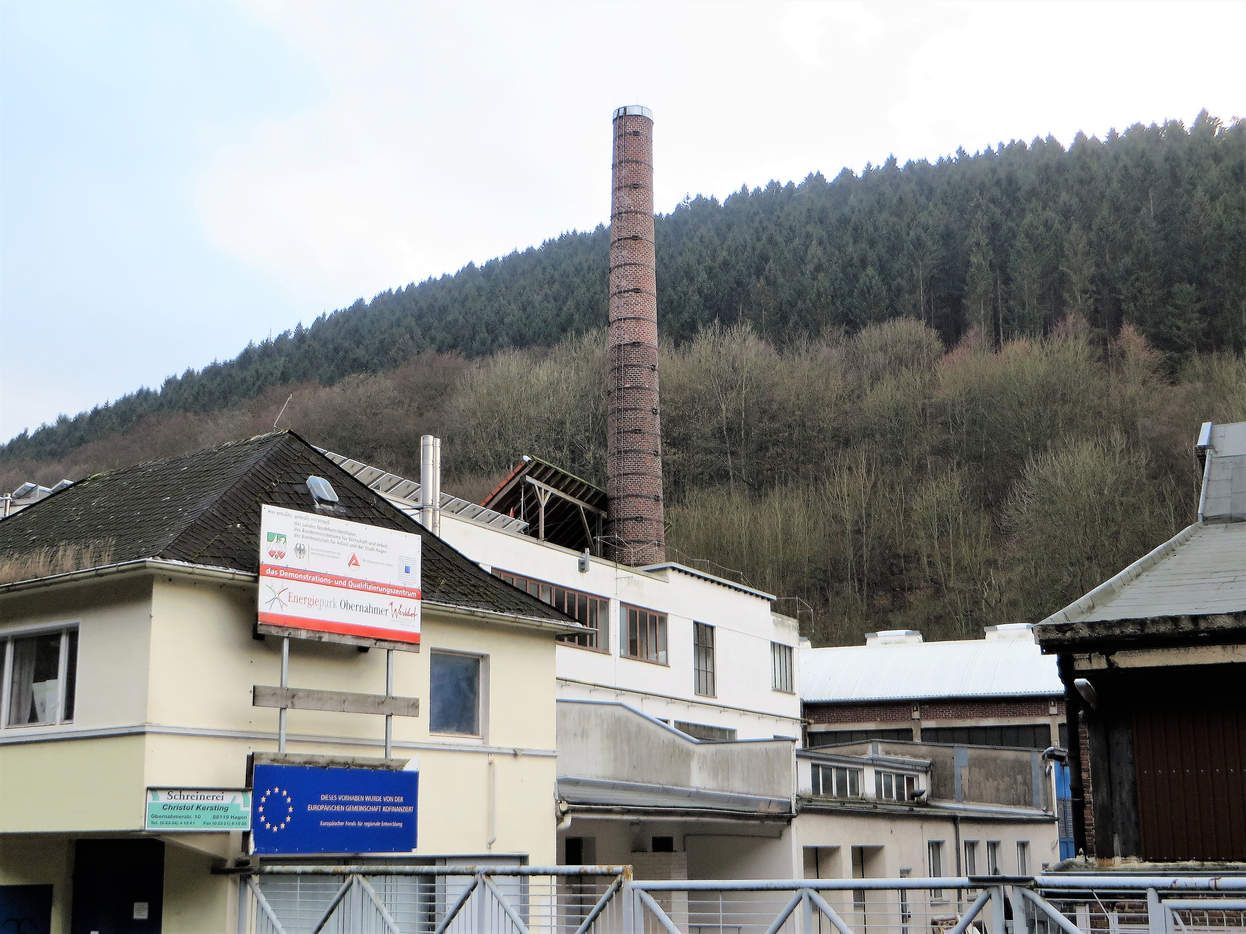 Historischer Fabrikkamin im Hagener Stadtteil Hohenlimburg, Ortsteil Nahmer, Obernahmerstraße 10. Ehemals WURAG Eisen- und Stahlwerke, Bochumer Verein und Krupp (Betrieb 1993 eingestellt). Heute Hagener Recycling Dienst (Werkhof) und Gewerbepark.